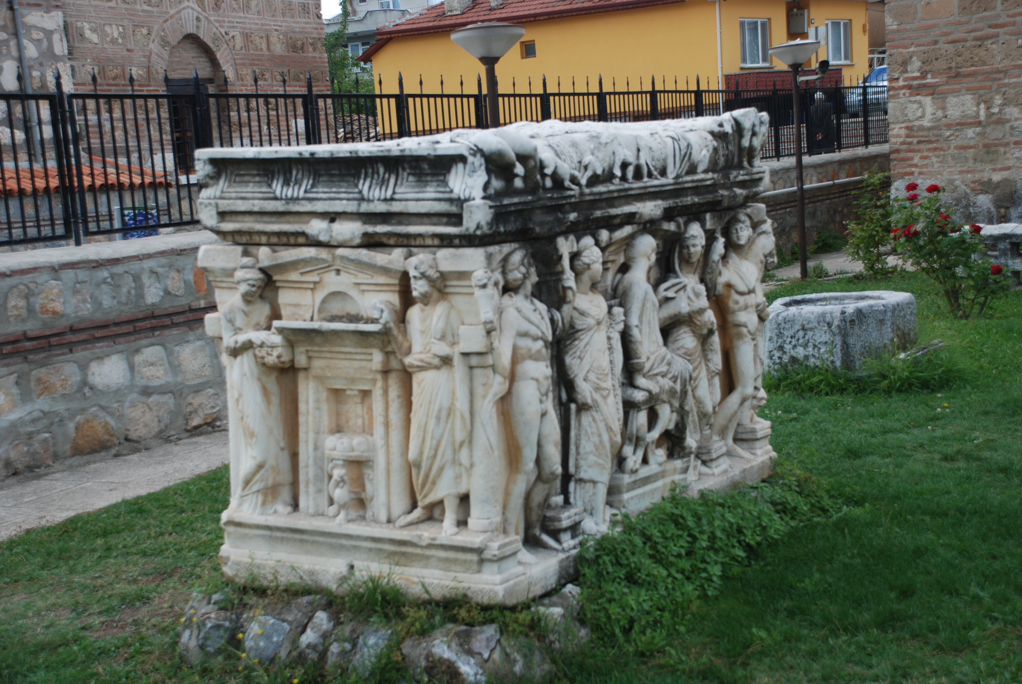 İznik müzesi bahçesi